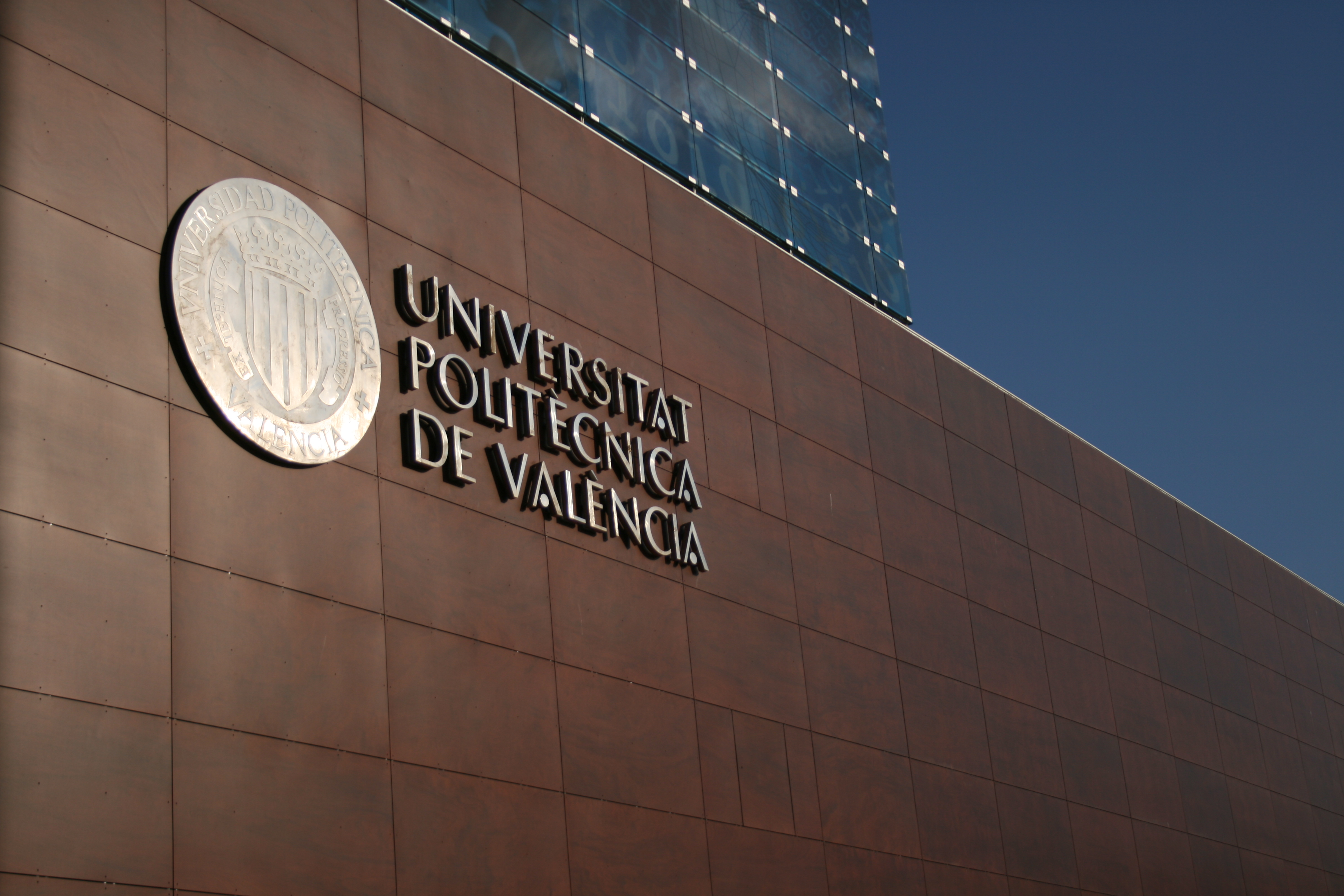 Universidad Politécnica de Valencia